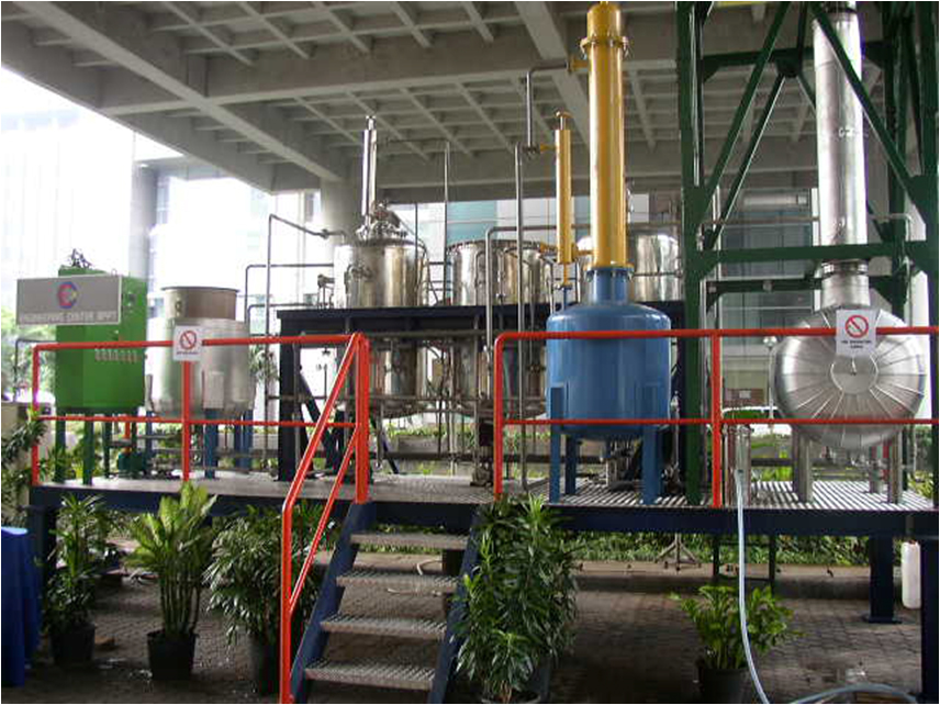 Pabrik pembuatan biodisel jarak pagar